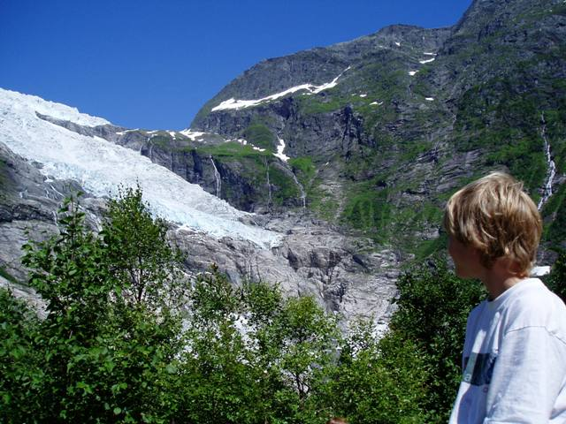 Bøyabreen sett i fra skogen utenfor Fjærland